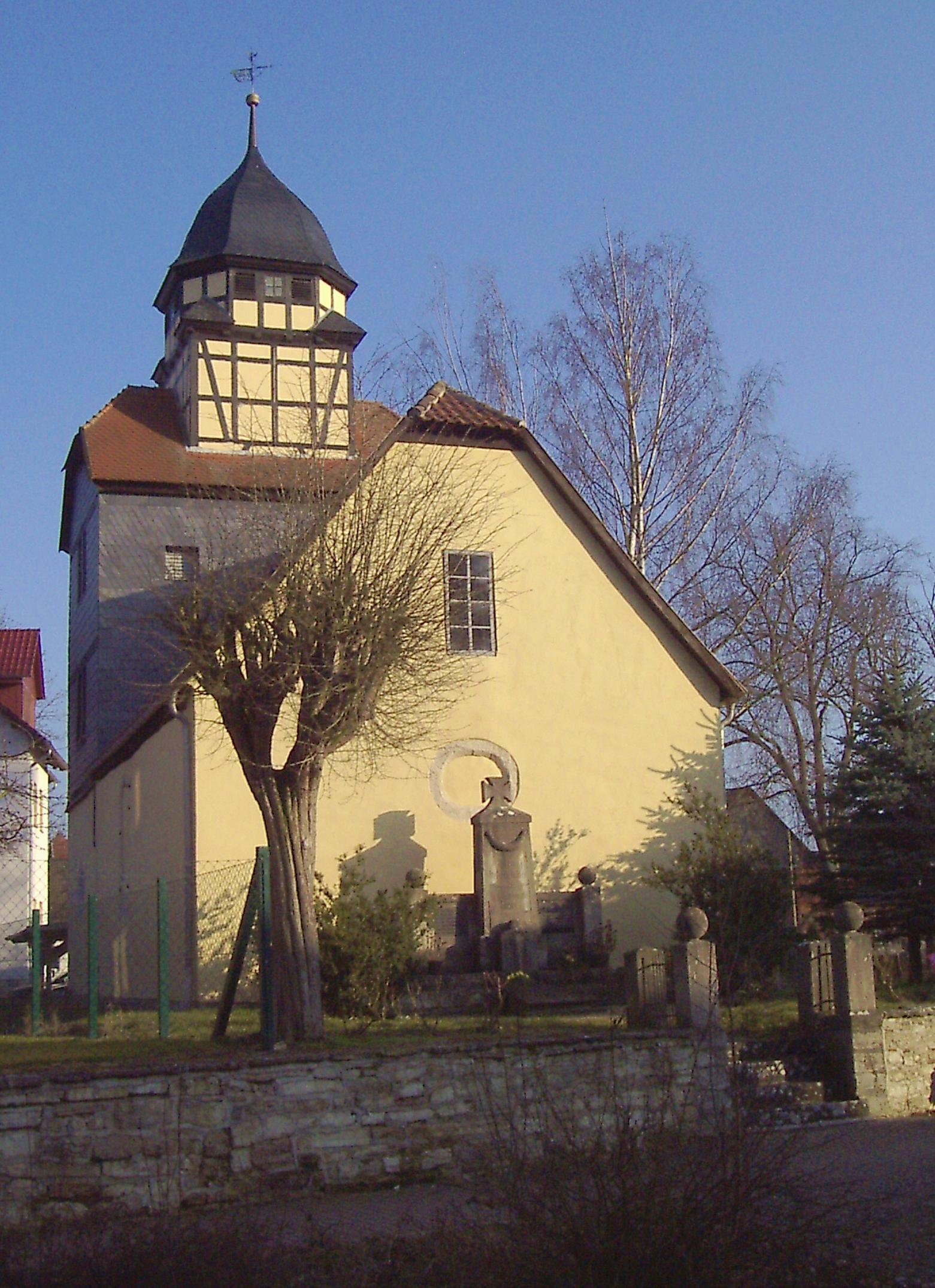 Evangelische Kirche von Reiser (Thüringen).